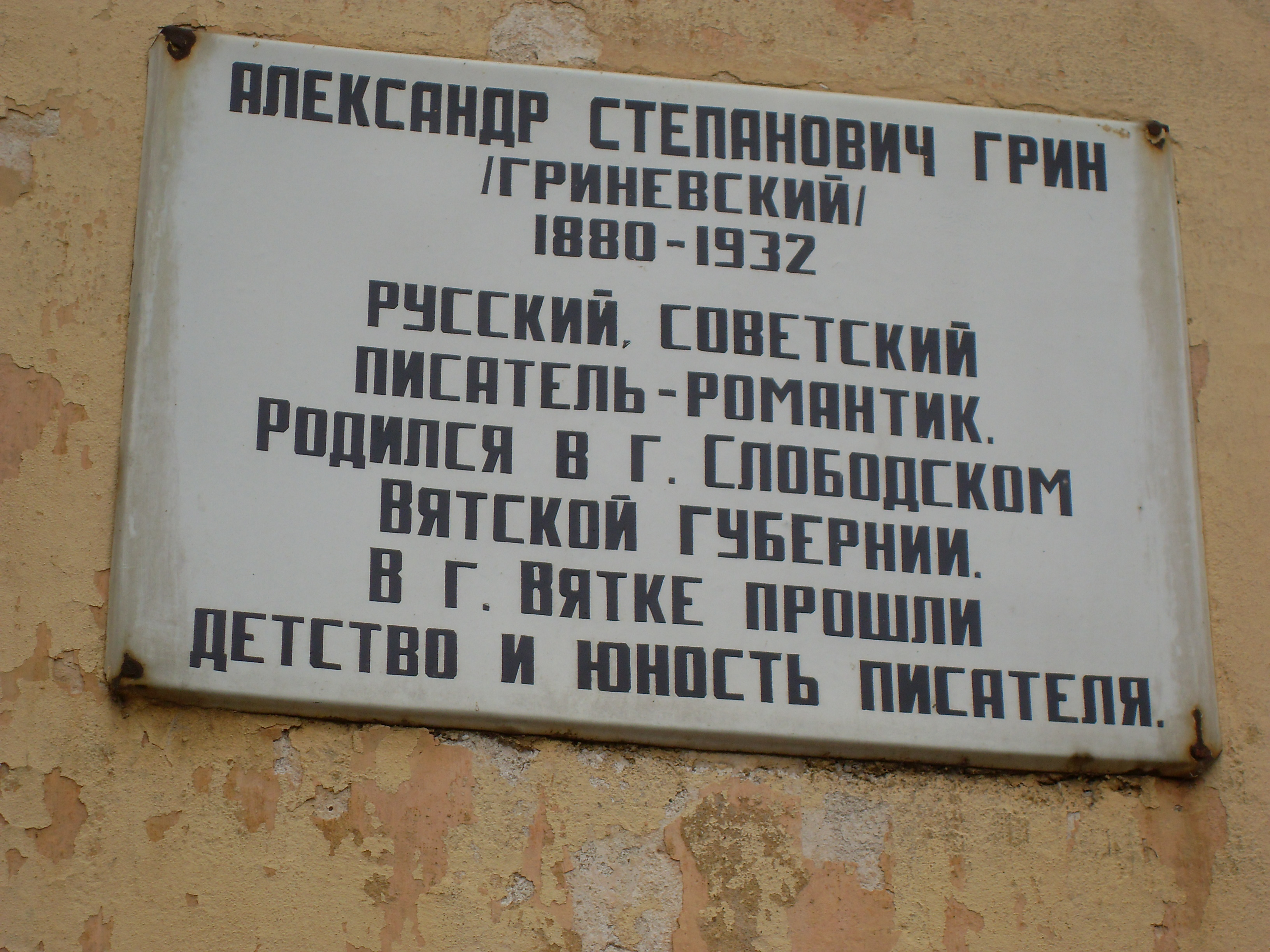 мемориальная доска Александру Степановичу Грину в г.Киров на набережной его имени